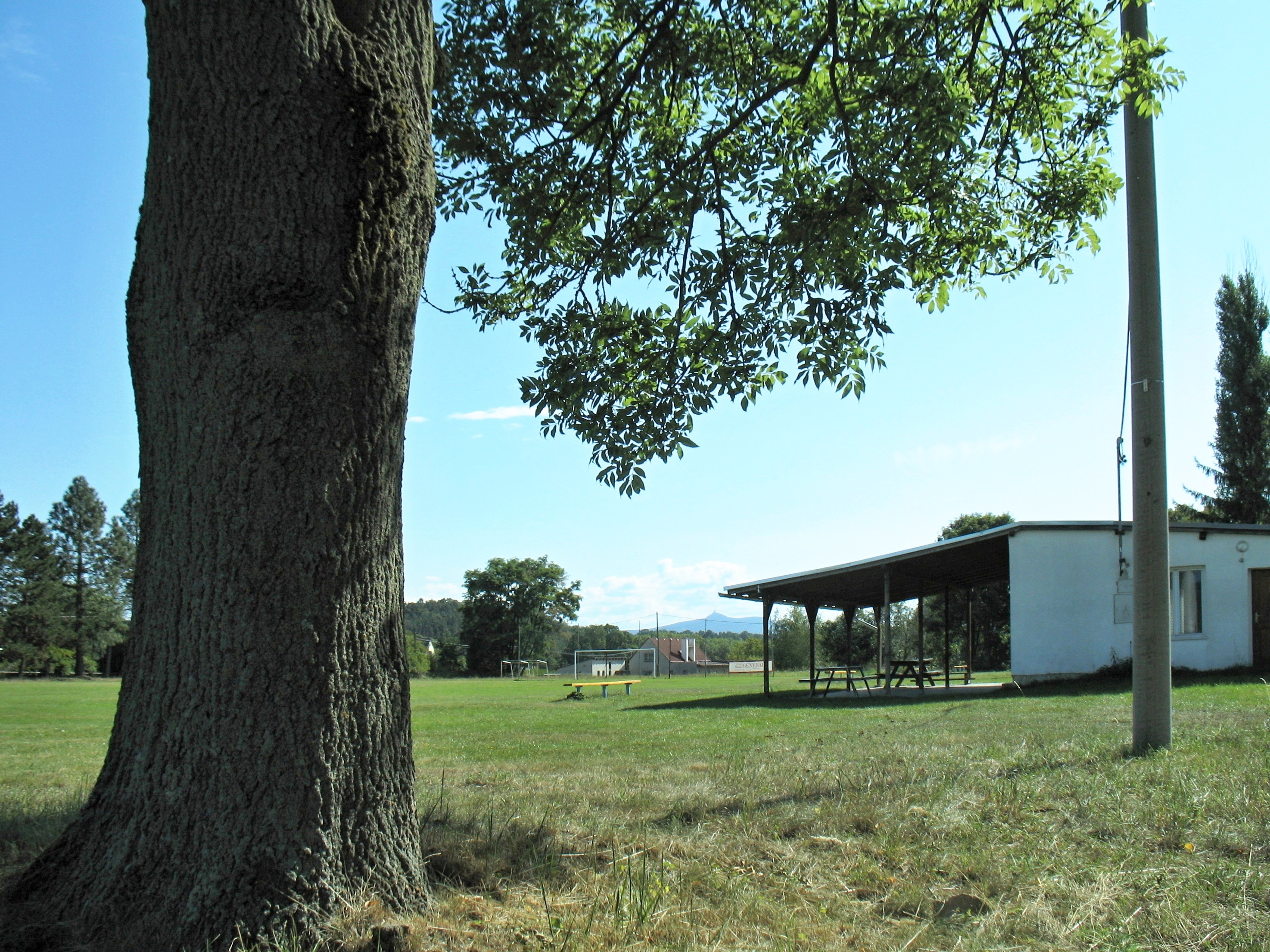 Velký Valtinov, okres Česká Lípa. Fotbalové hřiště, v pozadí Ještěd